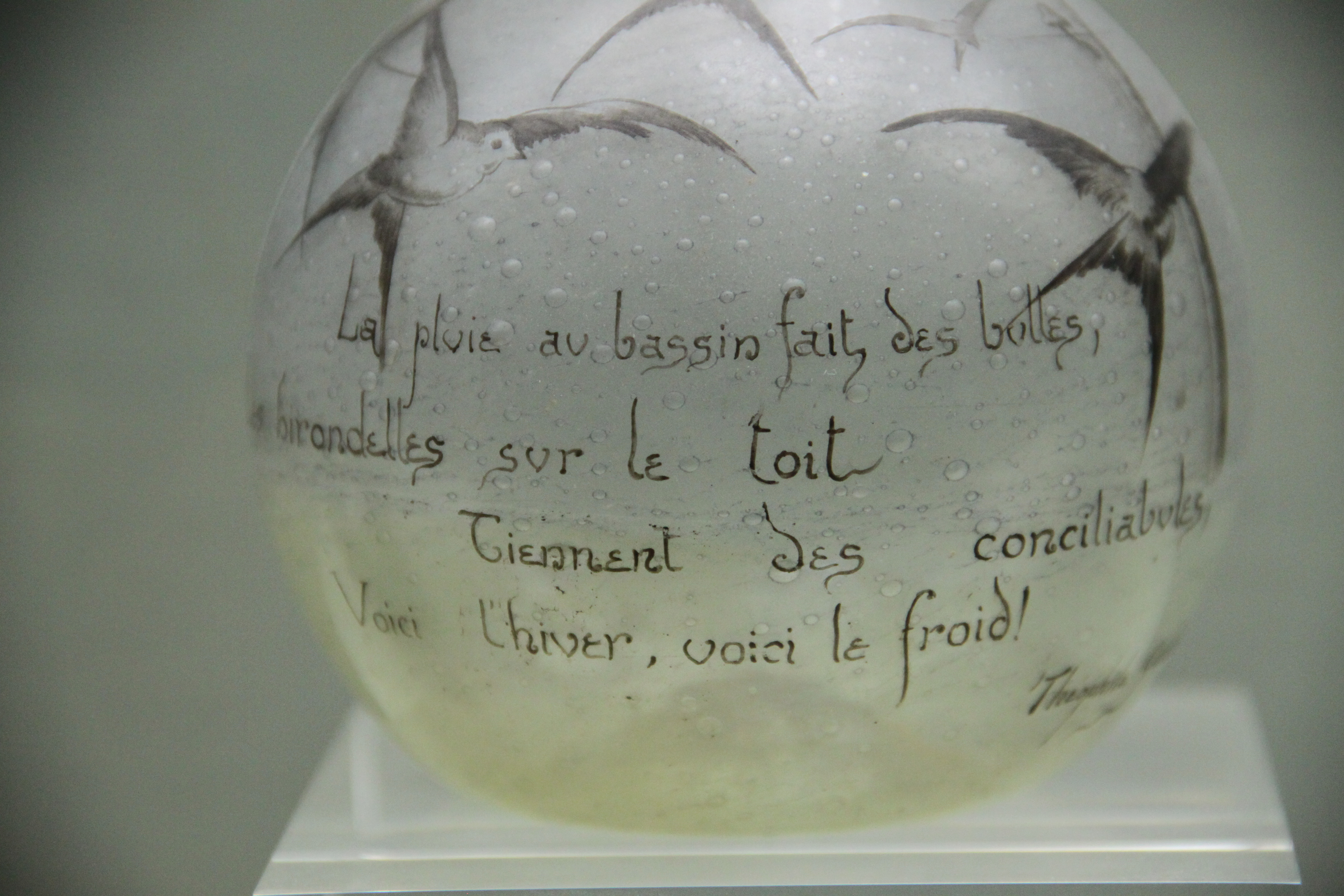 Émile Gallé (1846-1904) Vase La pluie au bassin fait des bulles, 1889 Signature sous la pièce E.Gallé/Nancy Inscription peinte à l'émail sur la pièce La pluie au bassin fait des bulles Les hirondelles sur le toit tiennent des conciliabules voici l'hiver, voici le froid Théophile Gautier Verre blanc bullé, décor émaillé en camaïeu brun bistre Achat de la commission du musée d'Art décoratif de Nancy à Gallé, 1904 (inv. AD41)